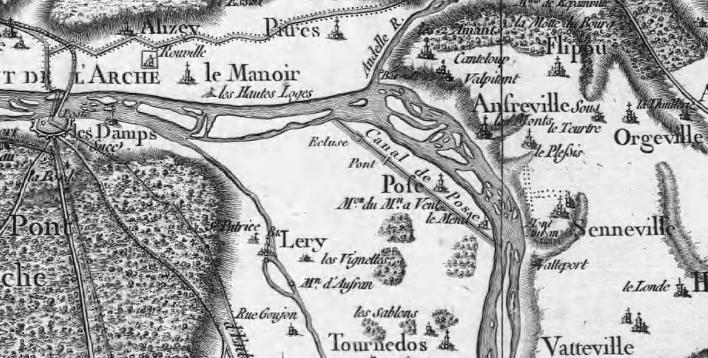 Extrait de la carte de Cassini (Carte générale de la France. 025, [Rouen. Nouv. éd.]. N°25 / [établie sous la direction de César-François Cassini de Thury]) La Seine de Pont-de-l'Arche à Poses.